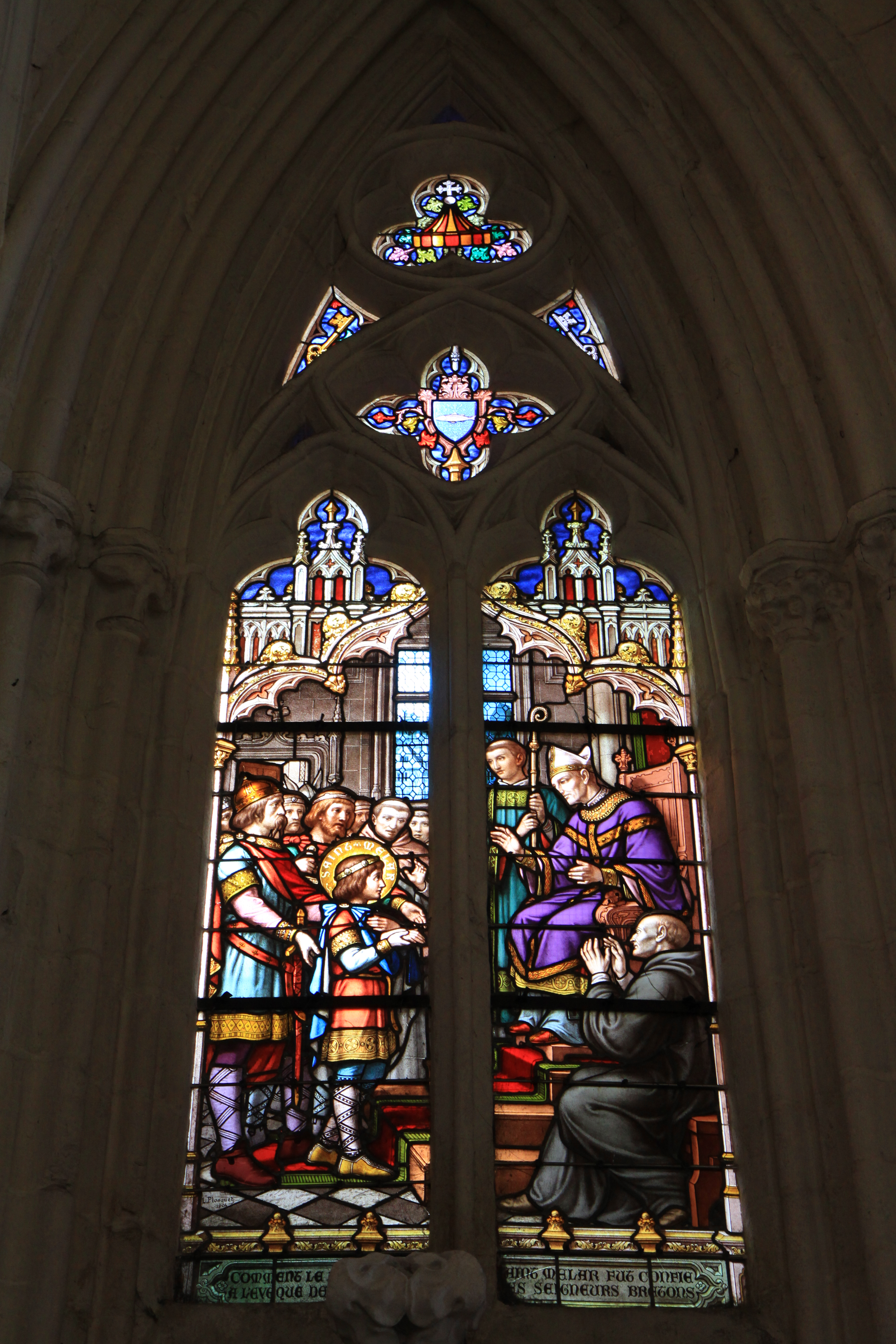 Un vitrail de la cathédrale Saint-Corentin de Quimper.